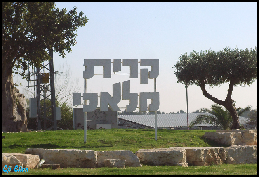 שילוט "ברוכים הבאים" בכניסה הדרומית לקרית מלאכי